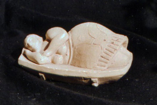 Soška ‚Spící kněžka‘, nalezená v hypogeu; jedna z mála sošek, u nichž je i hlava so called Sleeping lady in Hypogeum